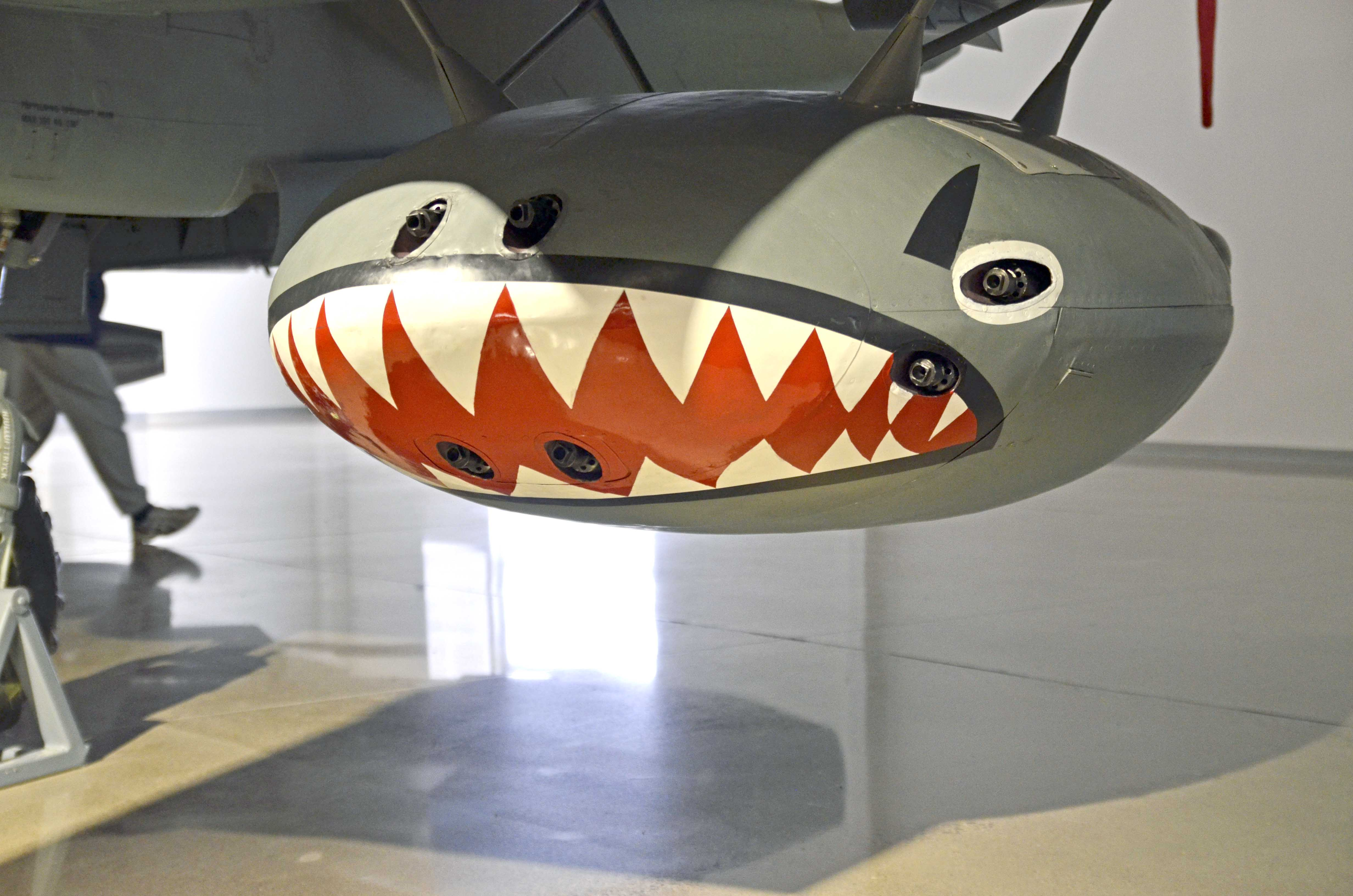 Vapenkapsel med kapacitet att bära åtta stycken ksp m/22. Kapseln kallades för paddan.